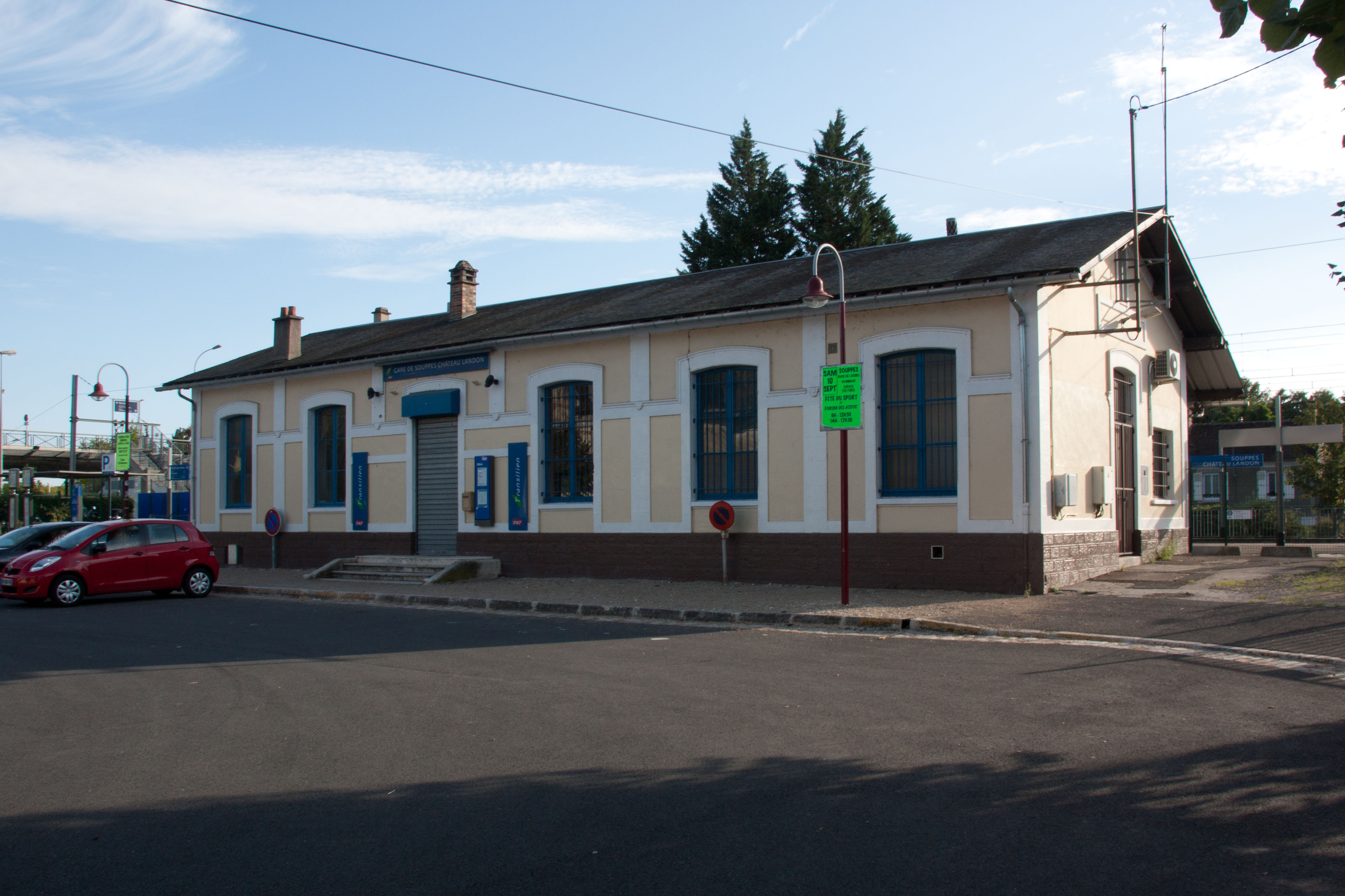 Gare de Souppes - Château-Landon, Souppes-sur-Loing, Seine-et-Marne, France.